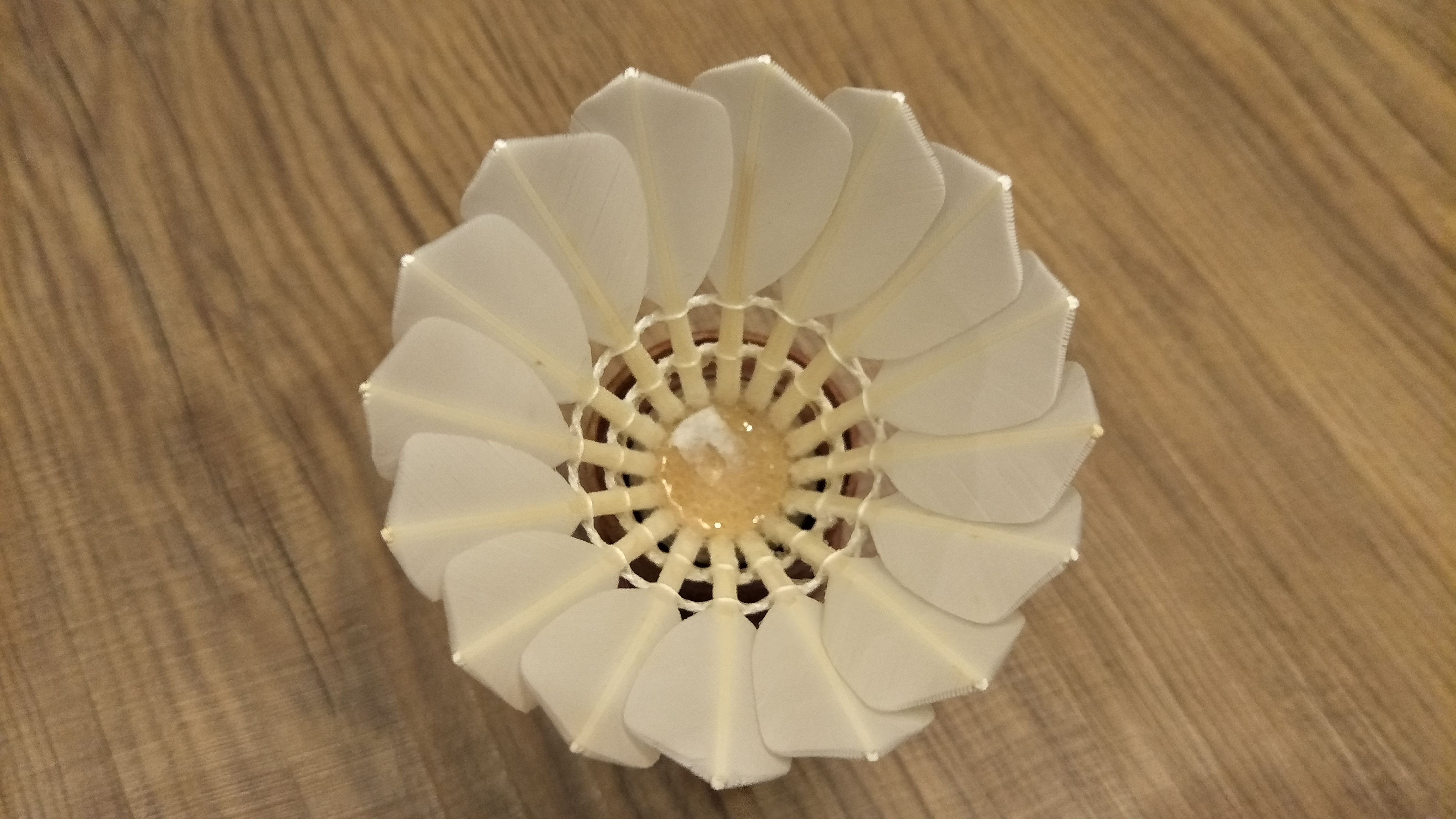 一顆羽球的內側